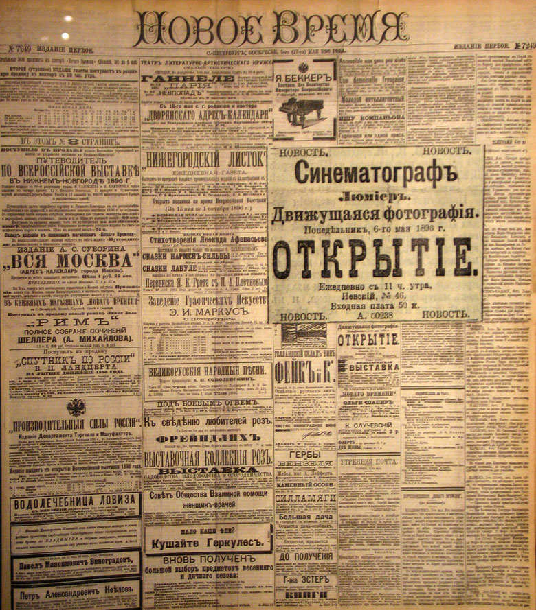 Новое время. - СПб., 5 мая 1896 г. № 7249.